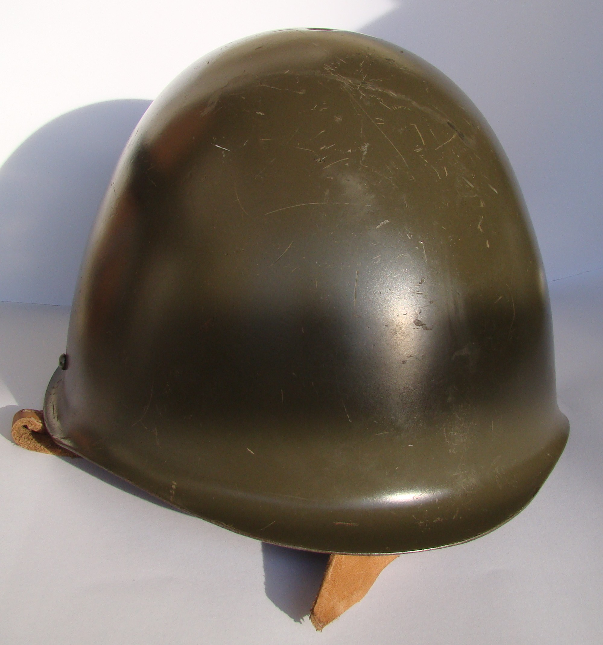 Hełm wz. 67 bez namalowanego orzełka. Wyprodukowany w roku 1971.